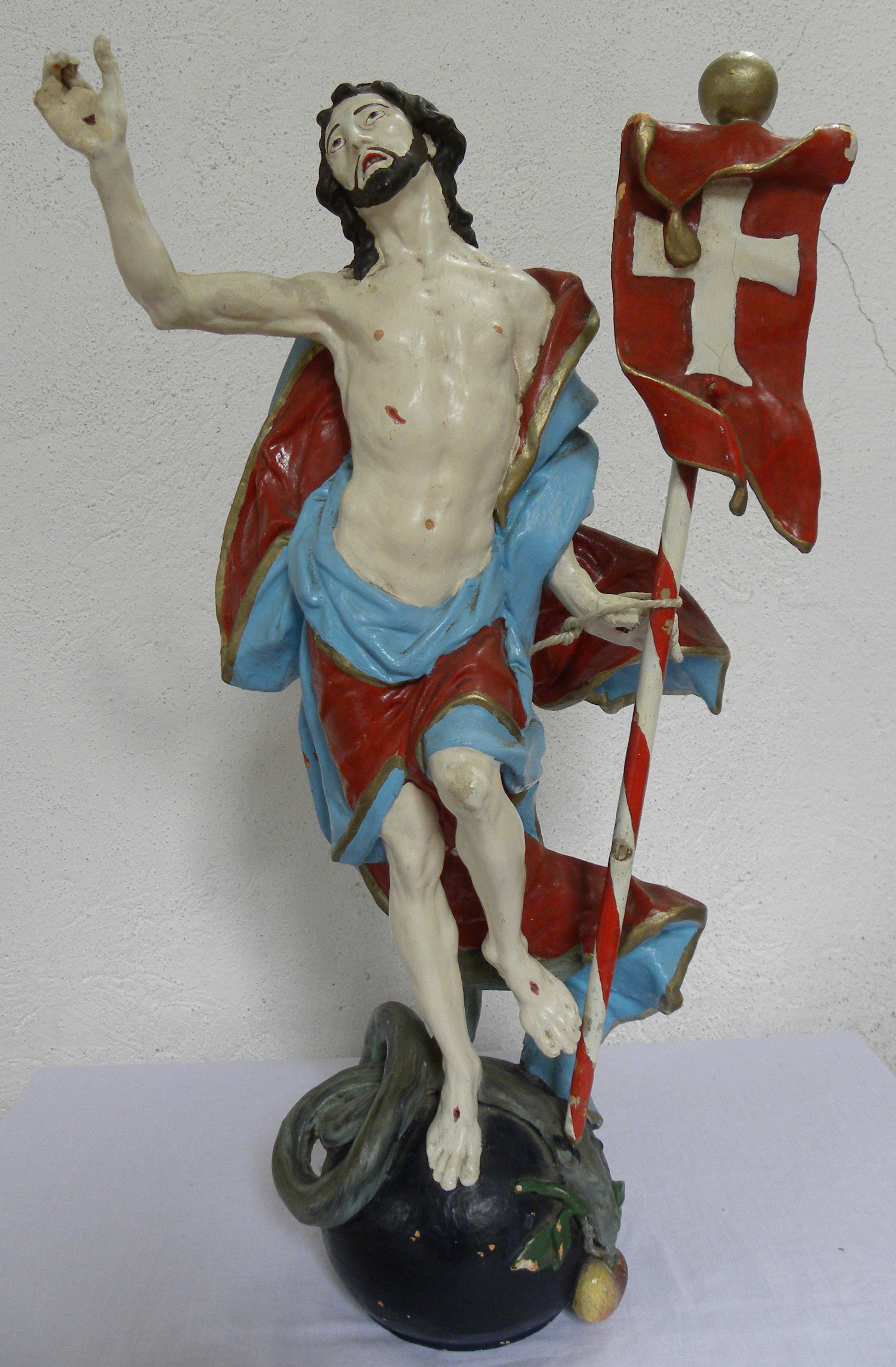 Figur des auferstandenen Christus von Joseph Stapf in der Pfarrkirche Unsere Liebe Frau vom Guten Rat von Hinterhornbach in Tirol, 1765